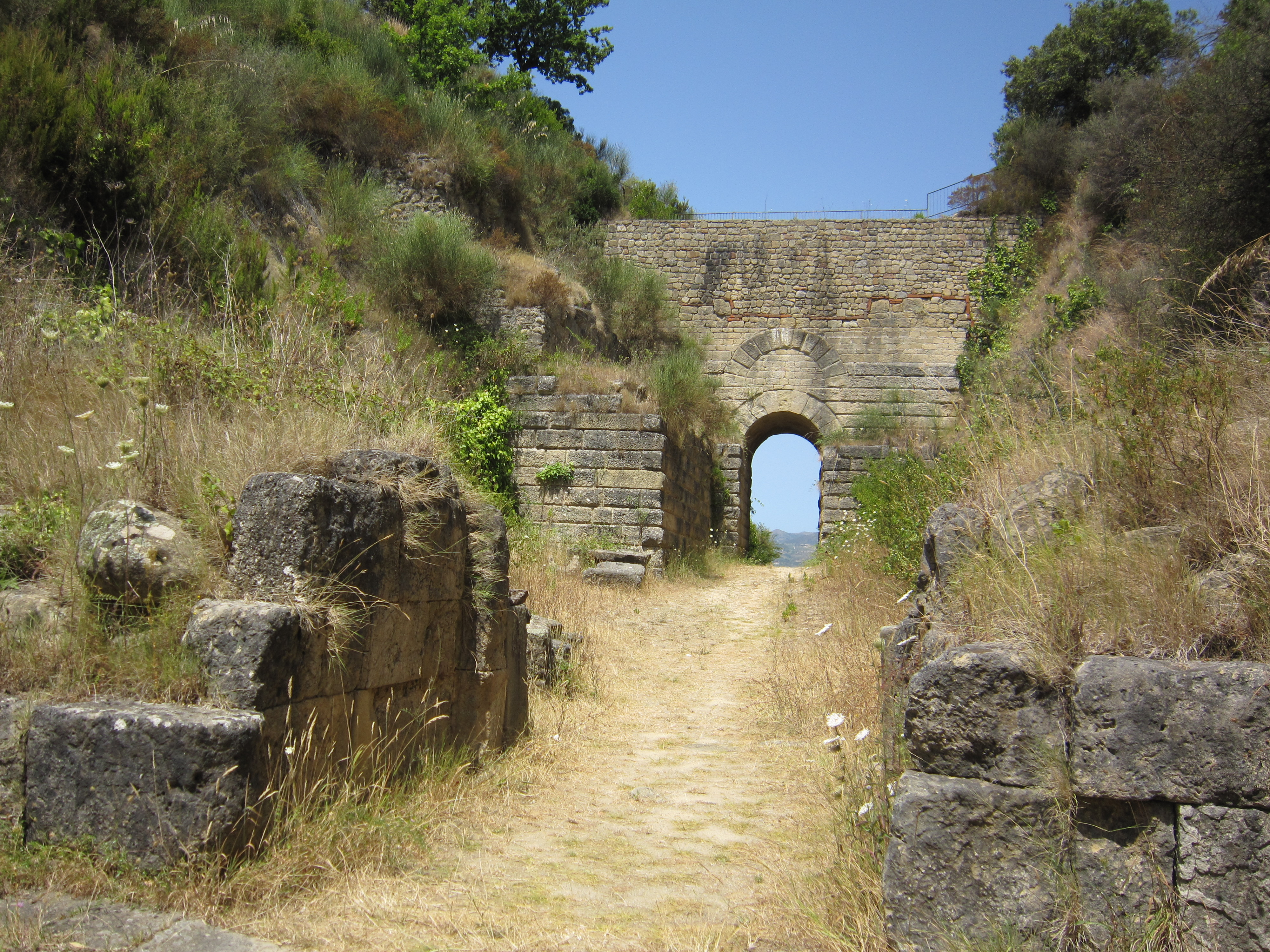 "Porta rosa" di Velia